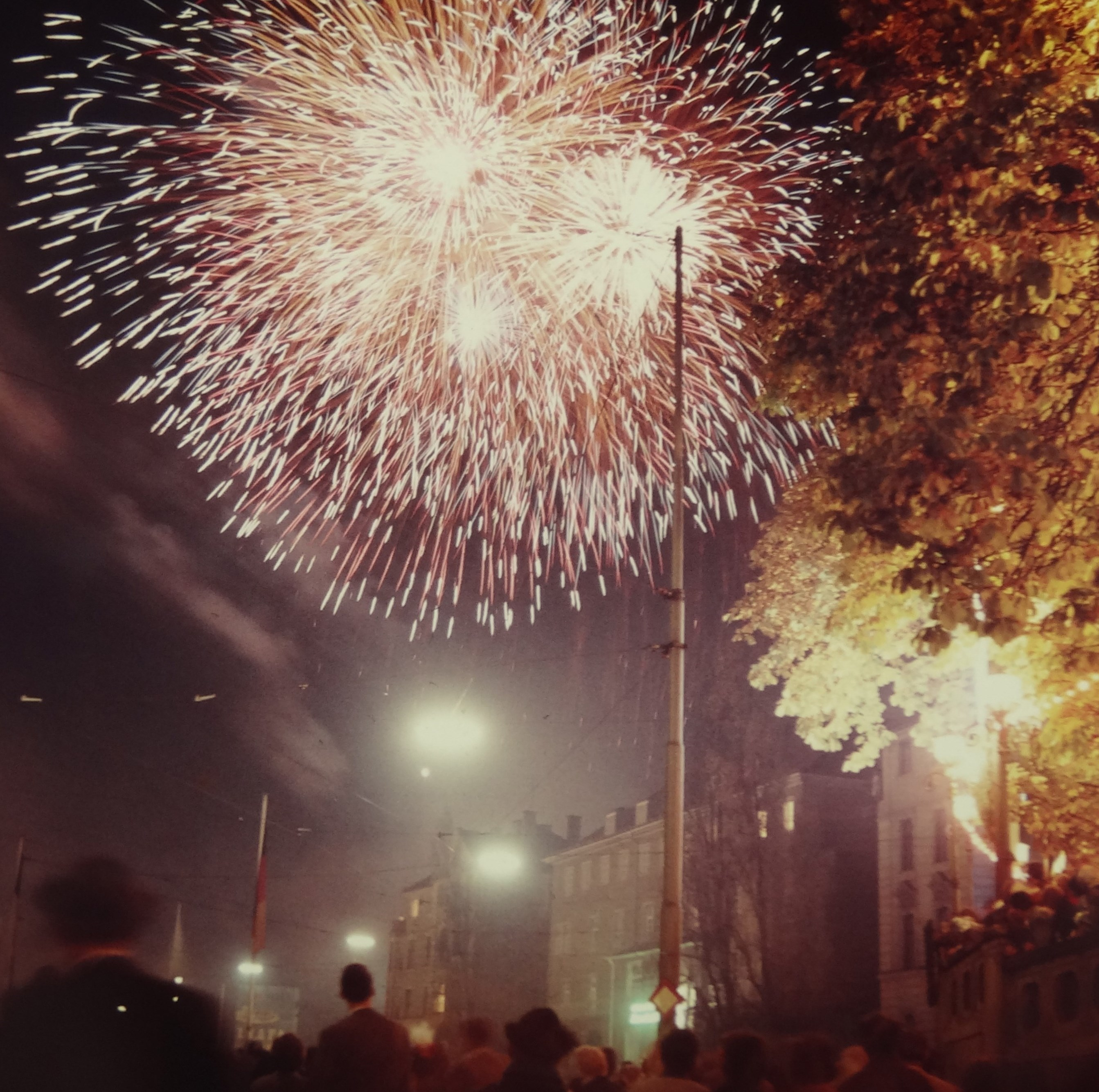 800 Jahre München 1958, Feuerwerk auf der Theresien Wiese